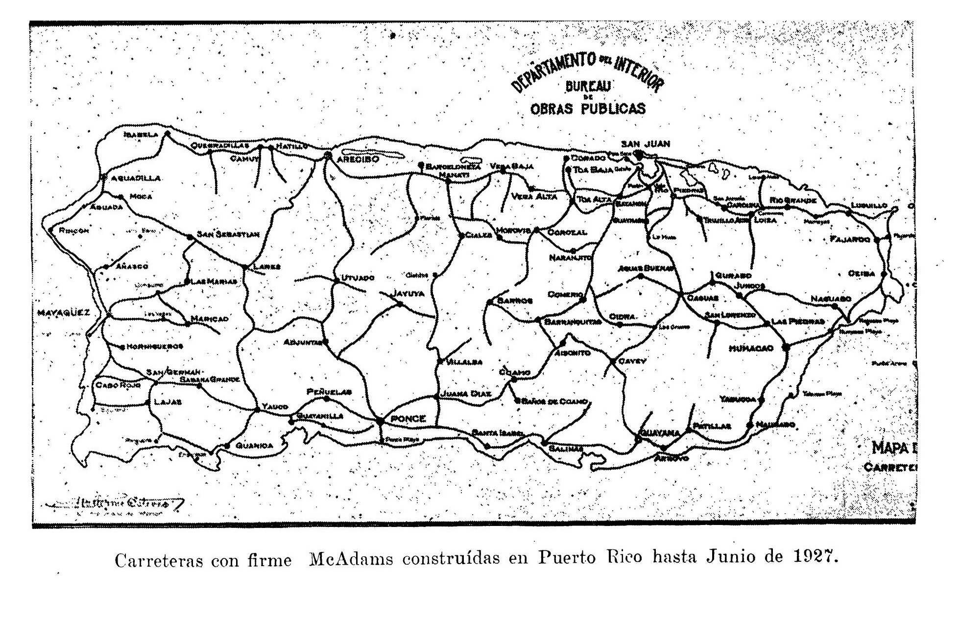 Carreteras con firme McAdams, Puerto Rico en 1927